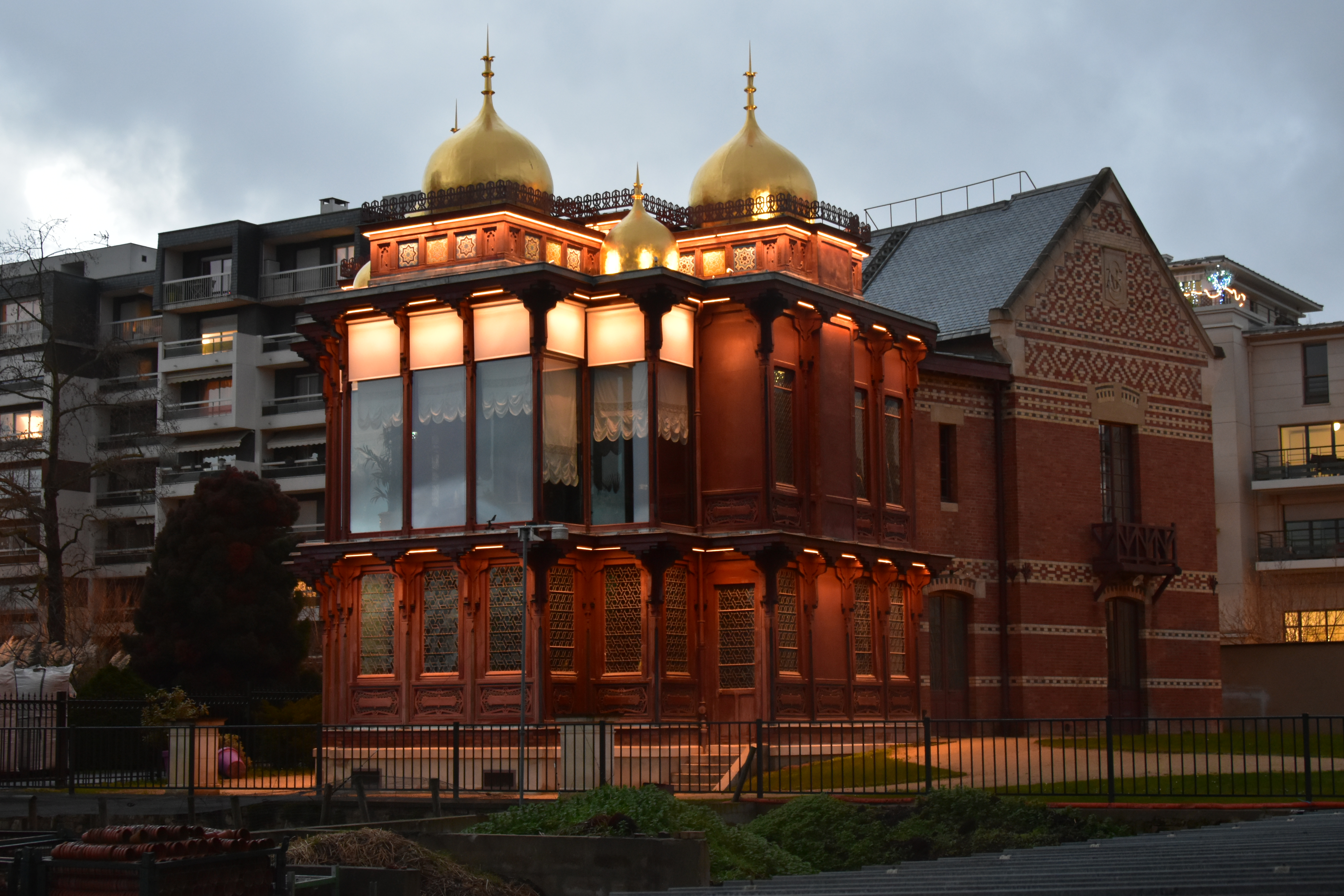 Le Pavillon des Indes vu avec son éclairage nocturne.